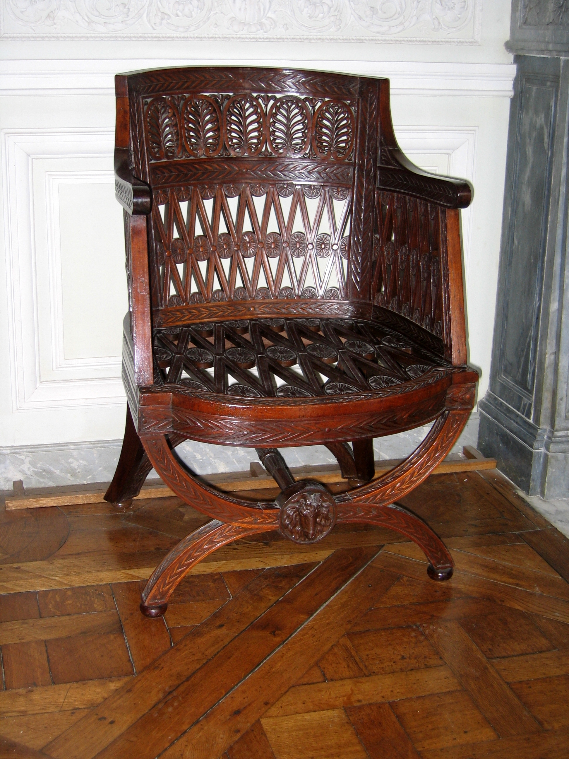 Georges Jacob (Français, 1730-1814) d'après le dessin de Hubert Robert (Français, 1733-1808): Fauteuil curule, 1787, dit de genre étrusque crée pour le pavillon de la Laiterie de Marie-Antoinette à Rambouillet, actuellement (2011) dans la Grande salle à manger du Petit Trianon, Versailles, France.